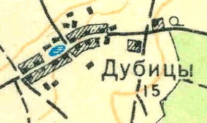 Топографическая карта Ленинградской области, квадрат О-35-24-Б-в (Вохоново), деревня Дубицы